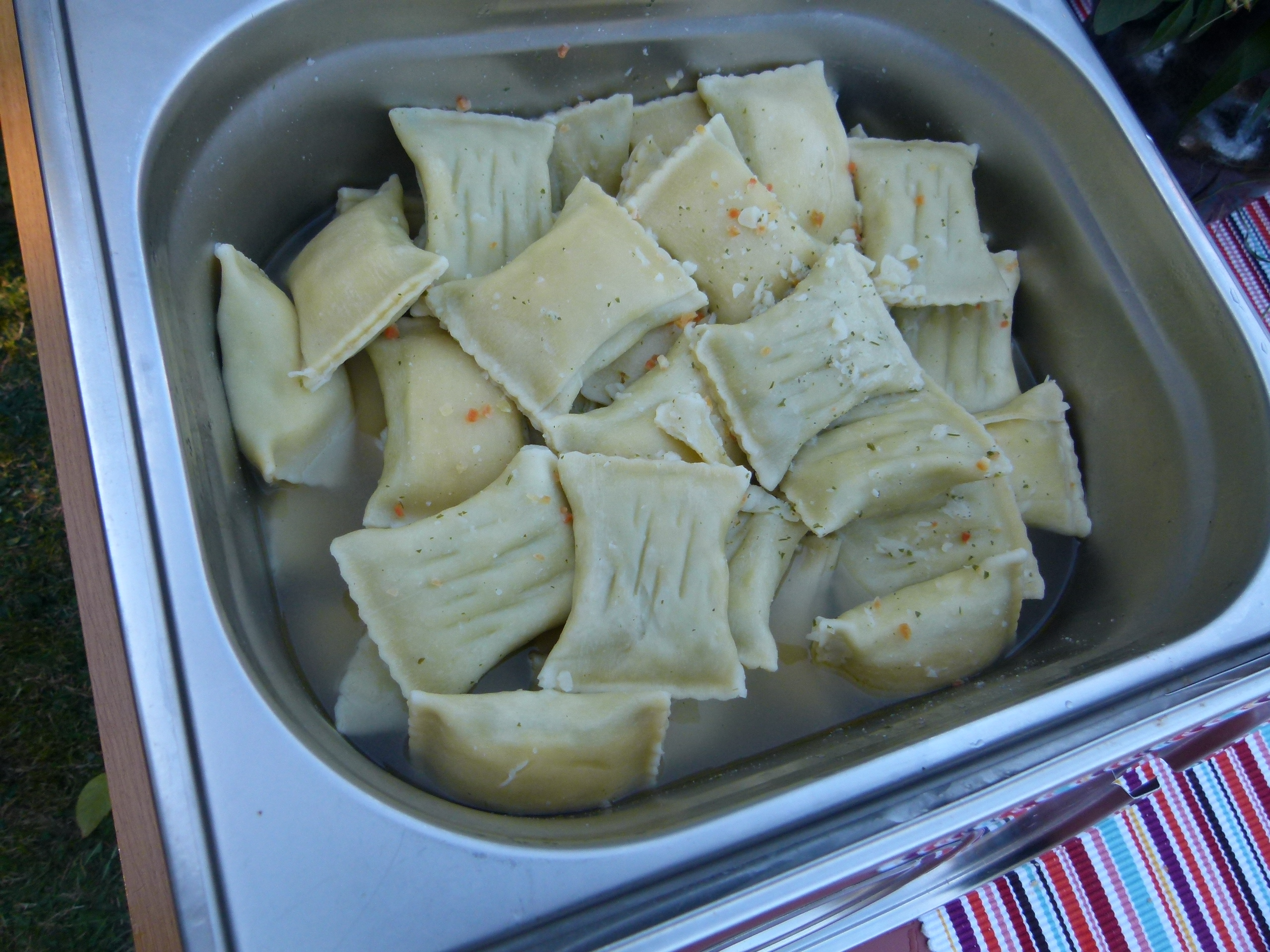 Schwäbische Maultaschen